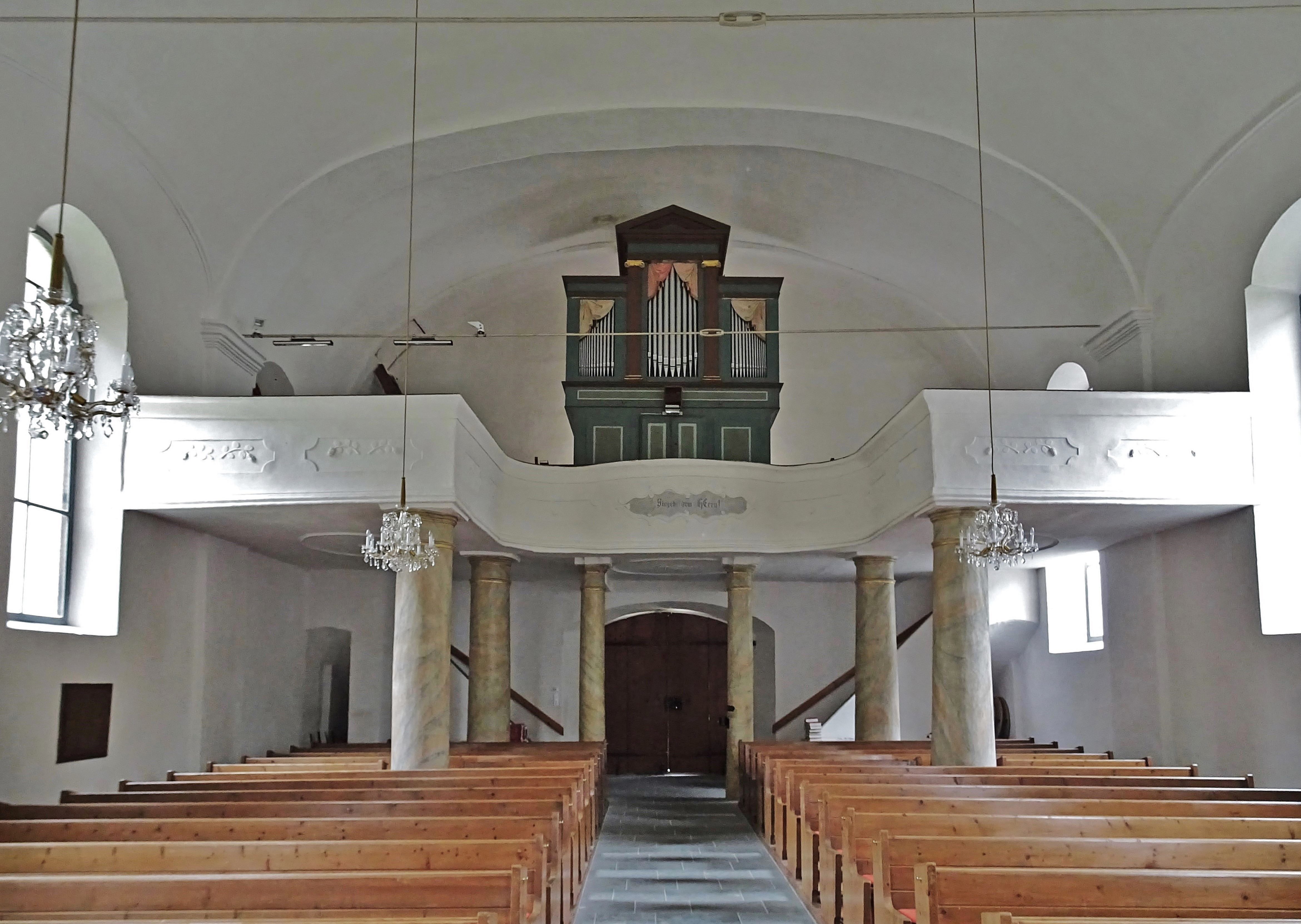 Evang. Pfarrkirche Eisentratten, Krems in Kärnten